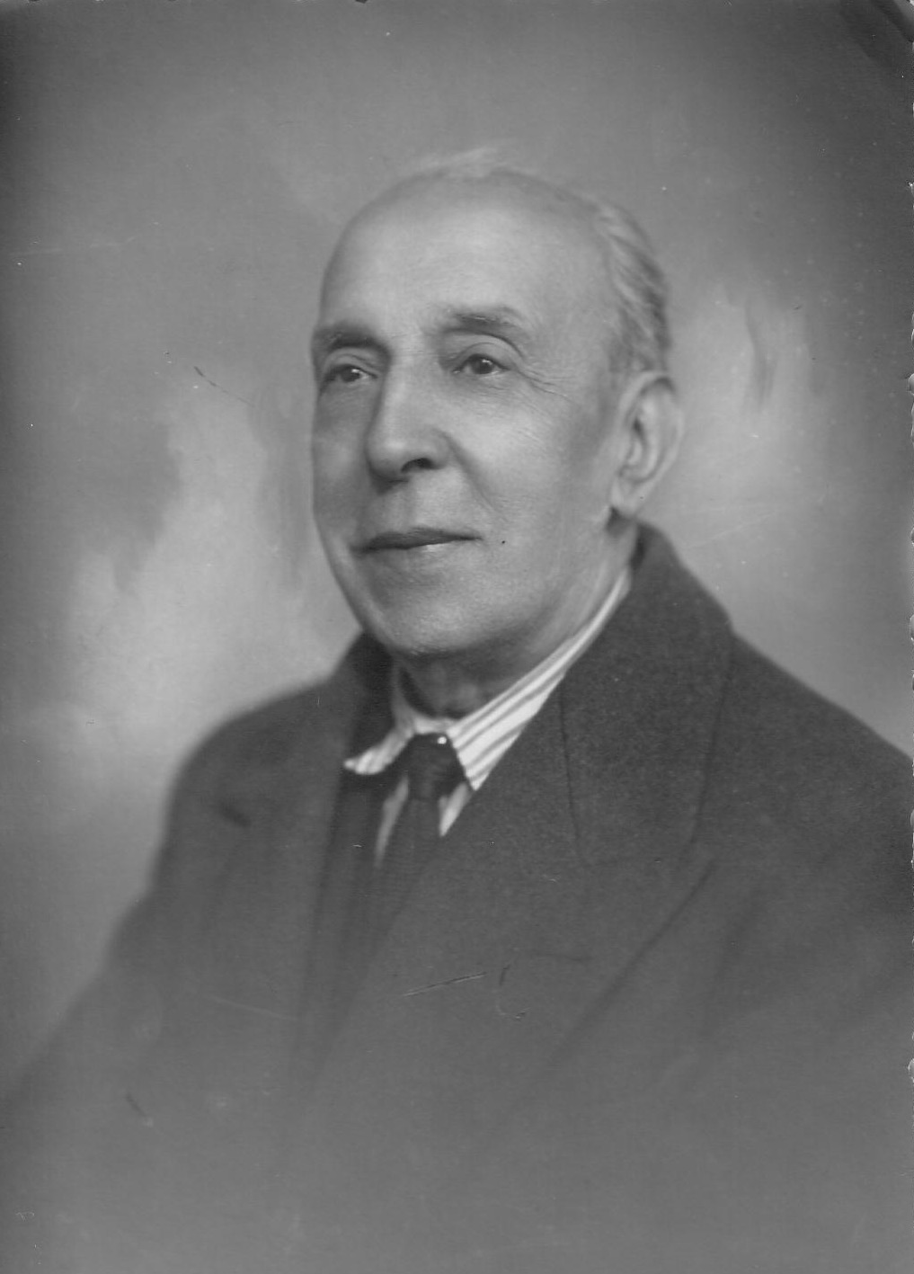 Foto de estudio de Eusebio Bosch i Humet en la década de los 1930s